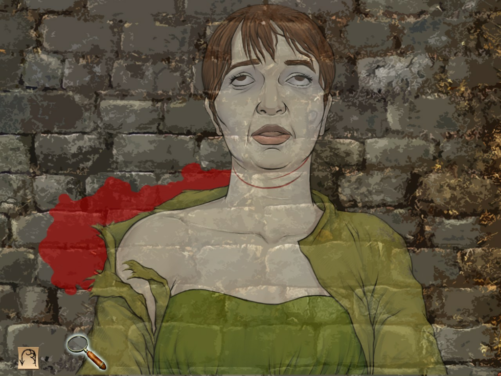 Capture d'écran du jeu Sherlock Holmes contre Jack l'Éventreur. Il s'agit d'un dessin du visage de Mary Ann Nichols, première victime du tueur. Le détective observera plusieurs éléments sur ce visage puis en tirera des déductions sur le tueur.